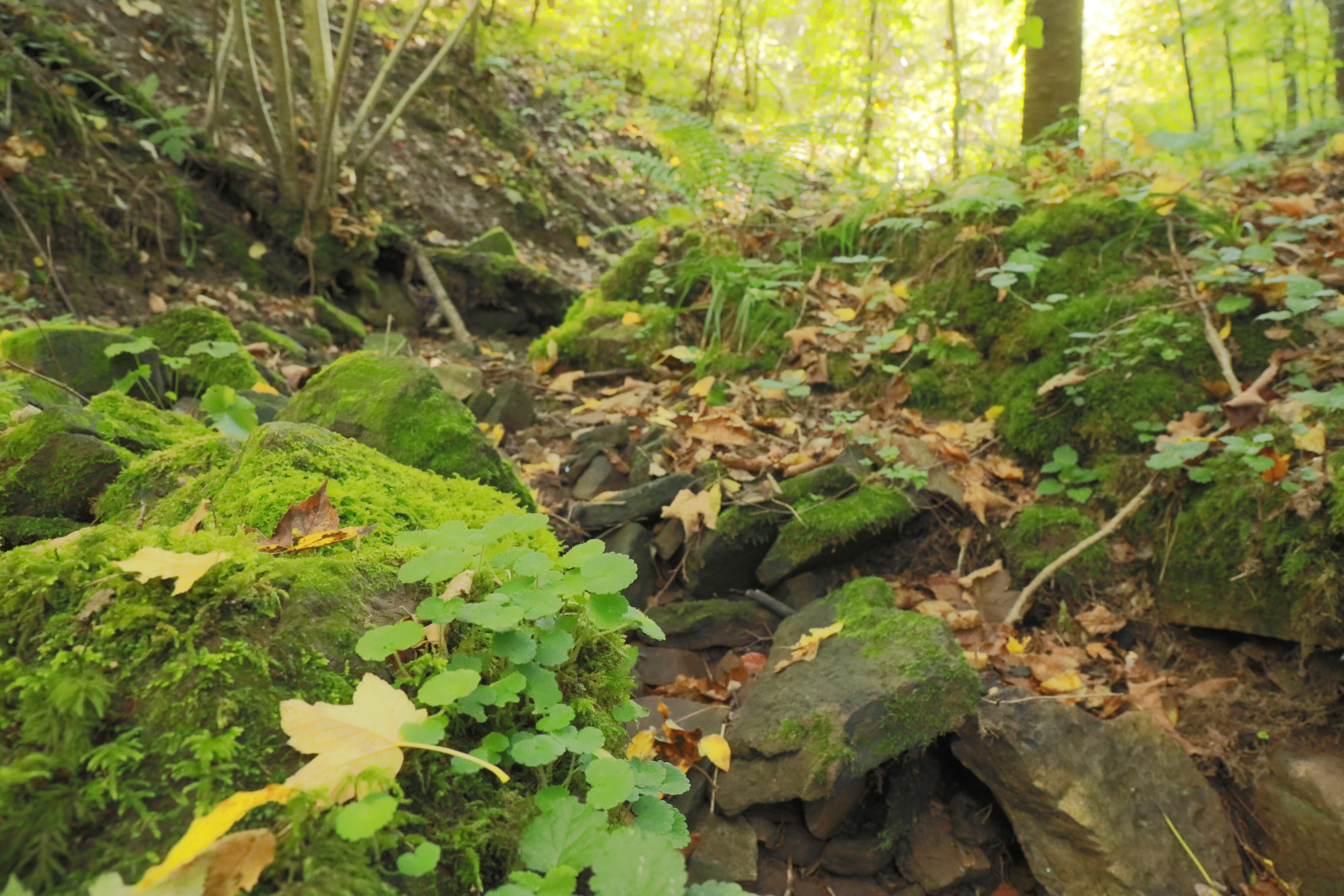 Essigwiesenklamm HDR Buntsandsteinaufschluss Geologie